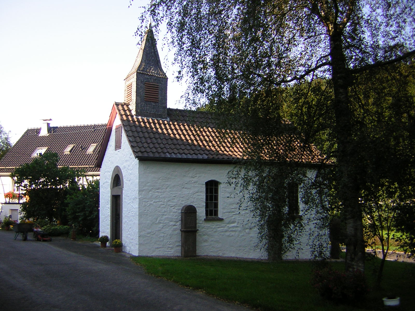 Kapelle in Vordermühle, Wipperfürth